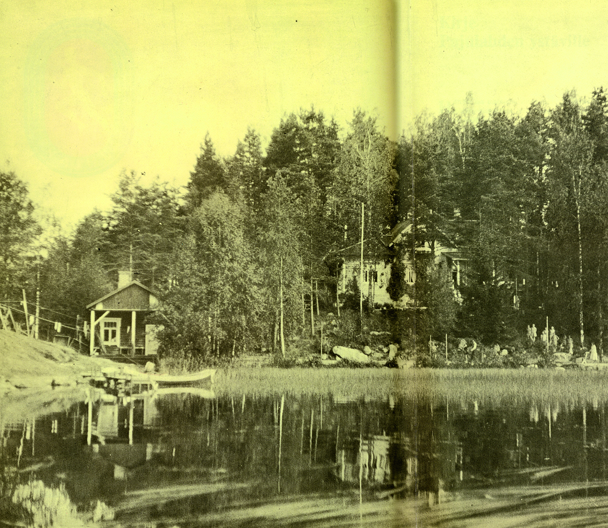 Pajulahti sellaisena kun se hankittiin vuonna 1929 naisten urheilukodiksi